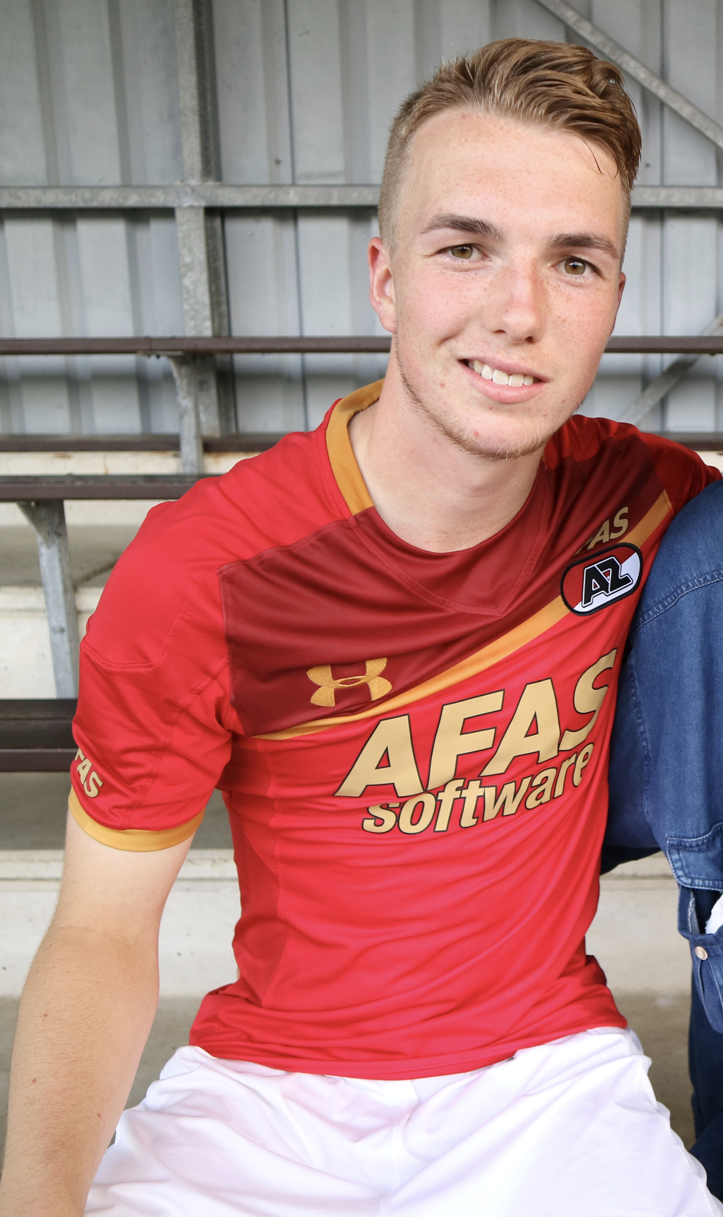 Justin Bakker